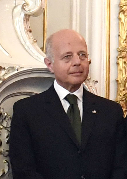 Am 3. Juni 2019 wurde Mag. Alexander Schallenberg als Bundesminister für Europa, Integration und Äußeres angelobt. Foto: Mahmoud